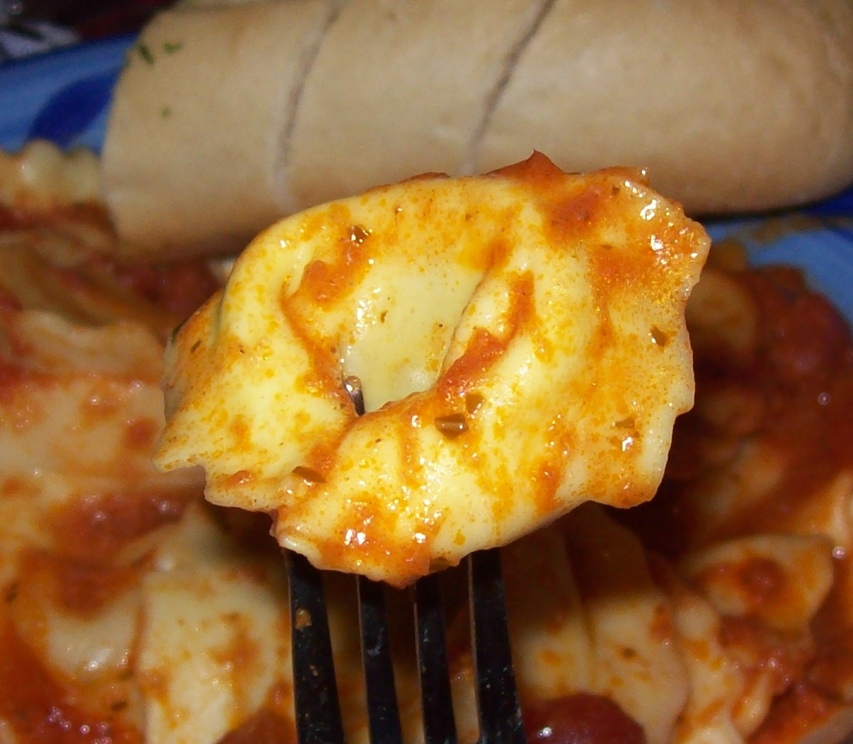 Tortelloni in a tomato sauce.